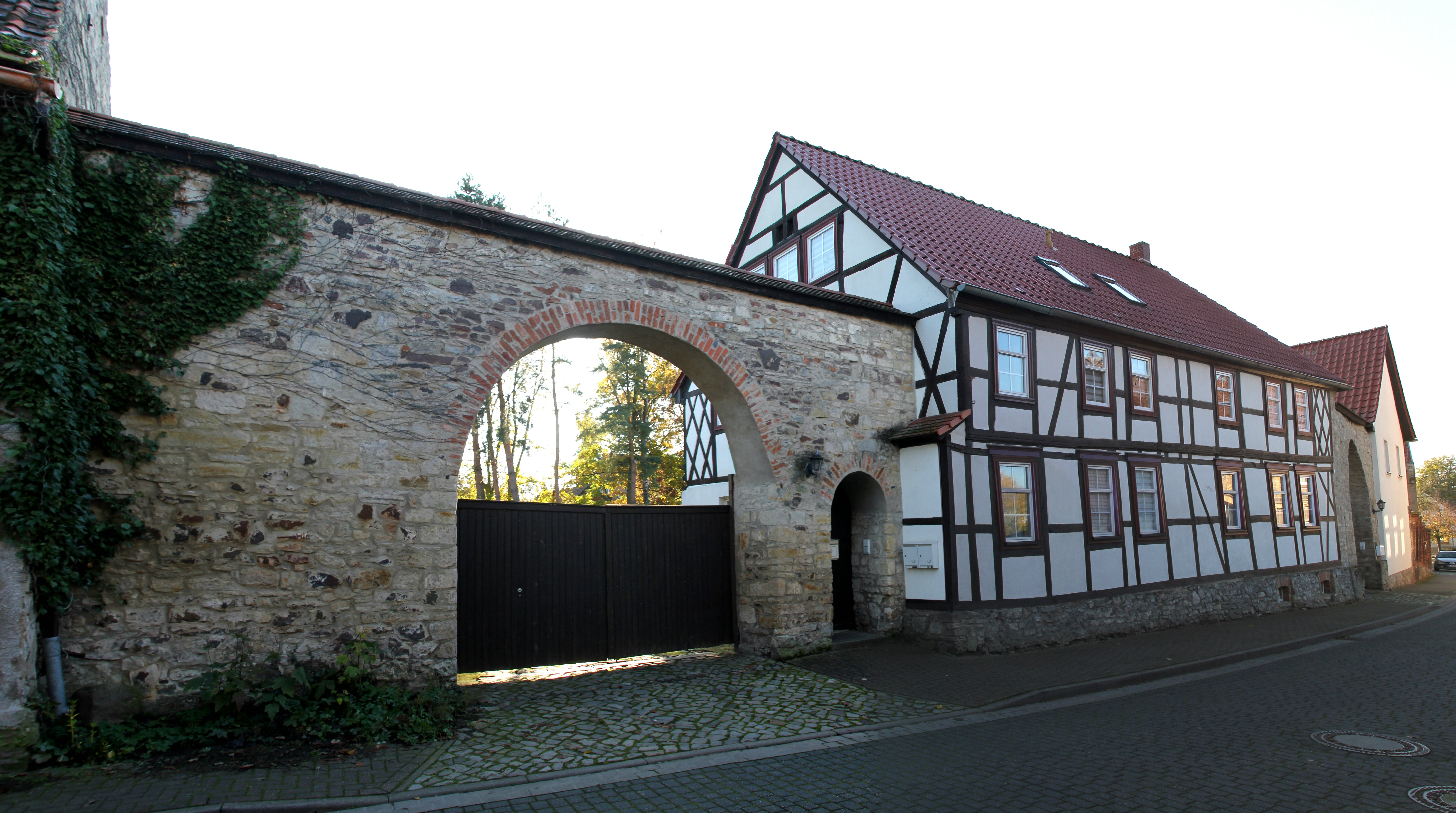 Bauernhof Krugstraße 4-4a Klein Rodensleben